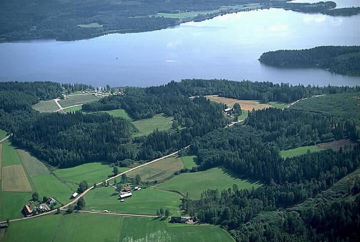 Skans i bildens mitt. Motiv: Eda skansar Nyckelord: Flygbilder, Riksintressen Kategori: Miljöer, Odlingslandskap Skans i bildens mitt. Eda skansar.